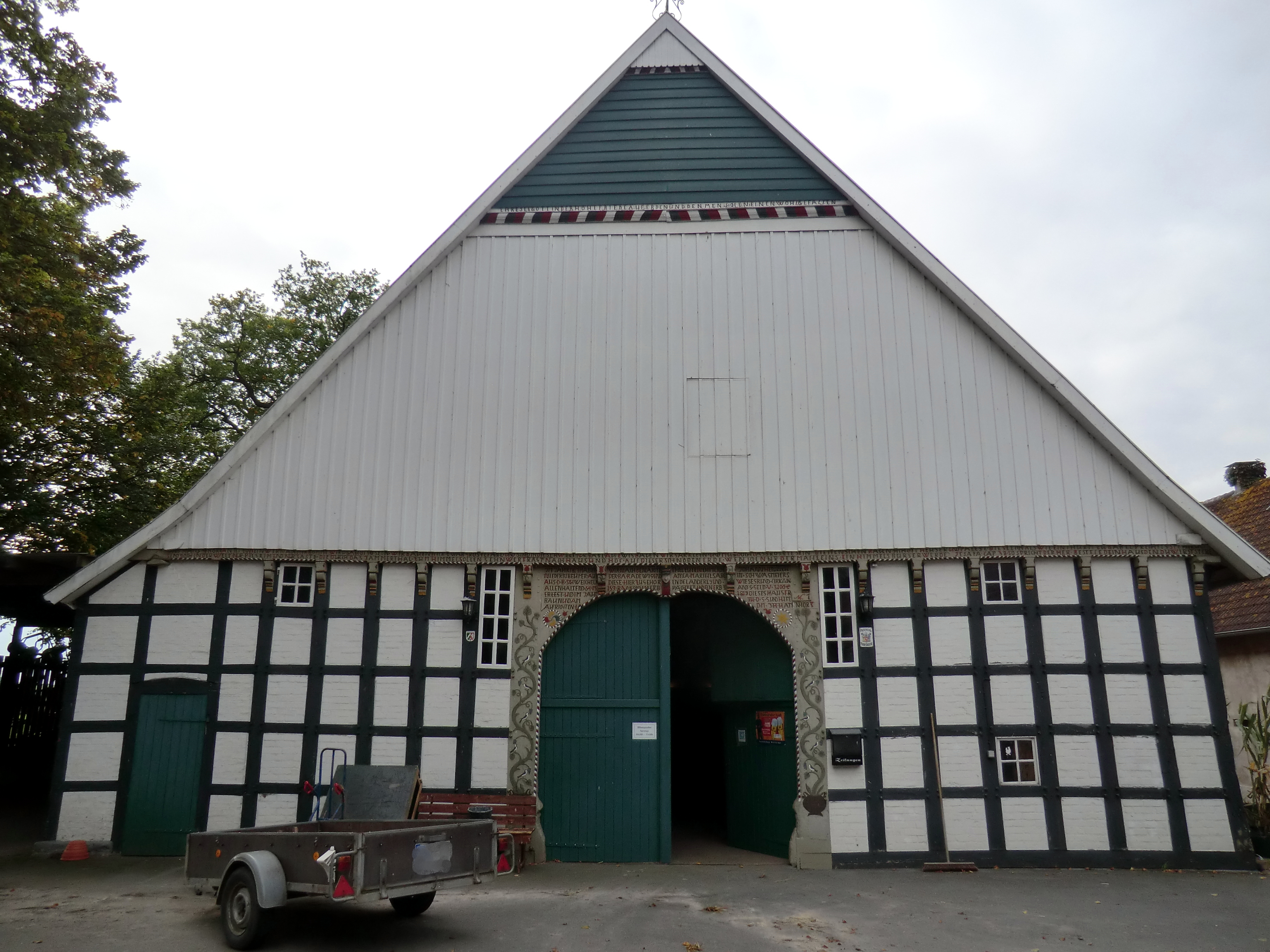 Deelentorfassade, BäumerhofThis is a photograph of an architectural monument., no. 22